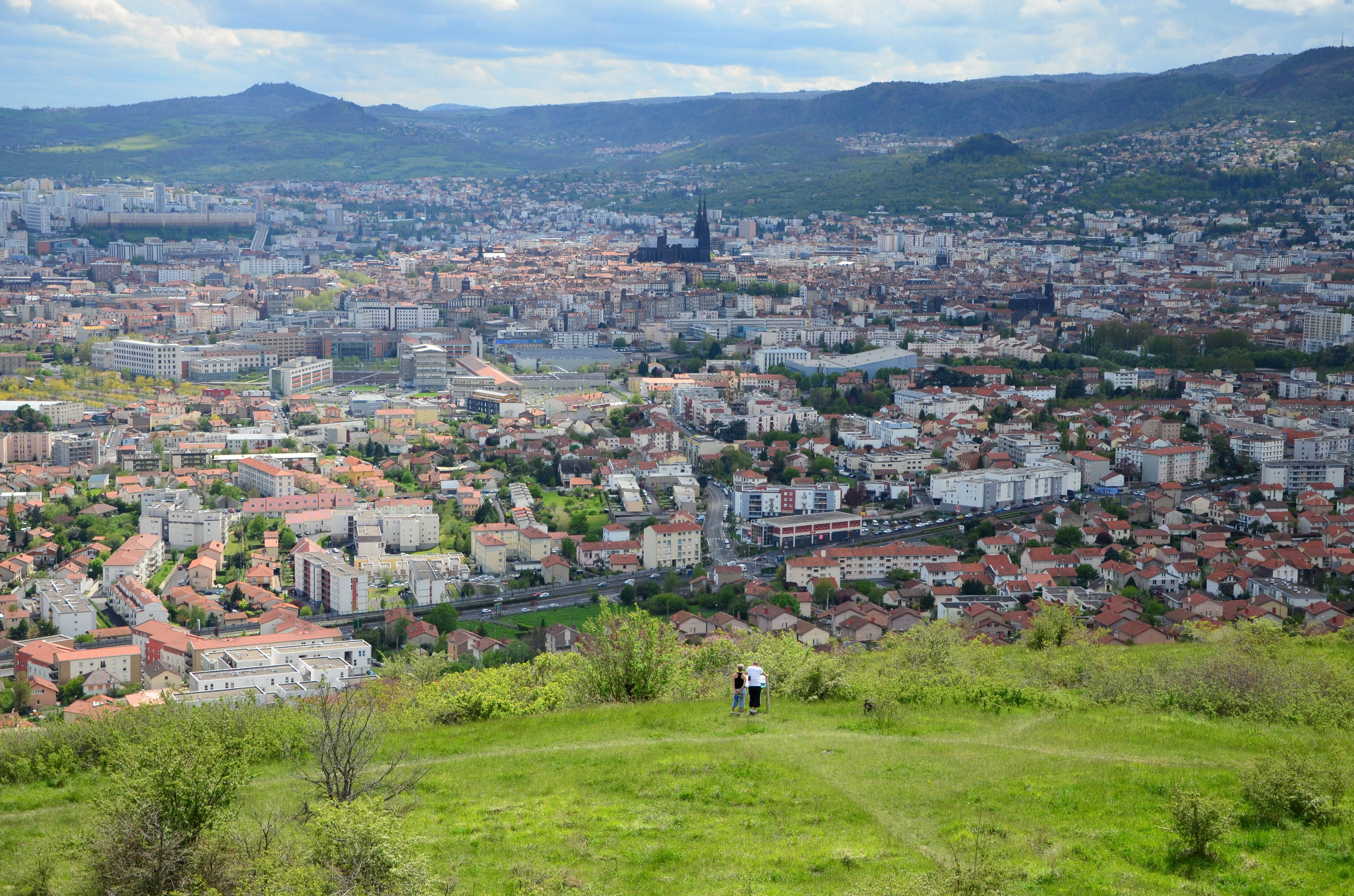 Vue de Clermont-Ferrand à partir des Côtes de Clermont (Chanturgue). On peut y apercevoir la Maison des Sports, le siège social de l'entreprise Michelin, la cathédrale et la basilique Notre-Dame-du-Port